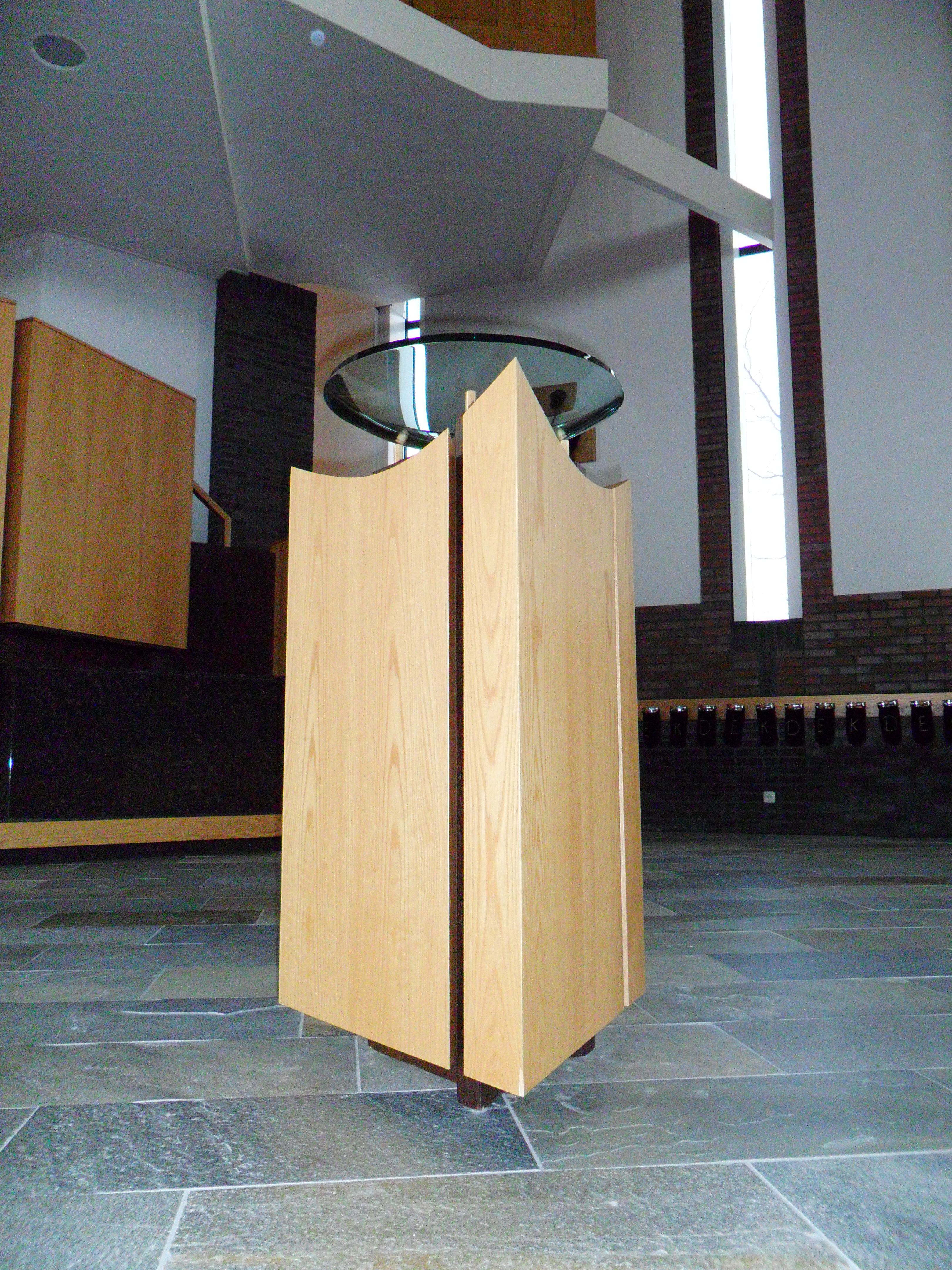 Doopvont van de Gereformeerde Gemeente te Genemuiden